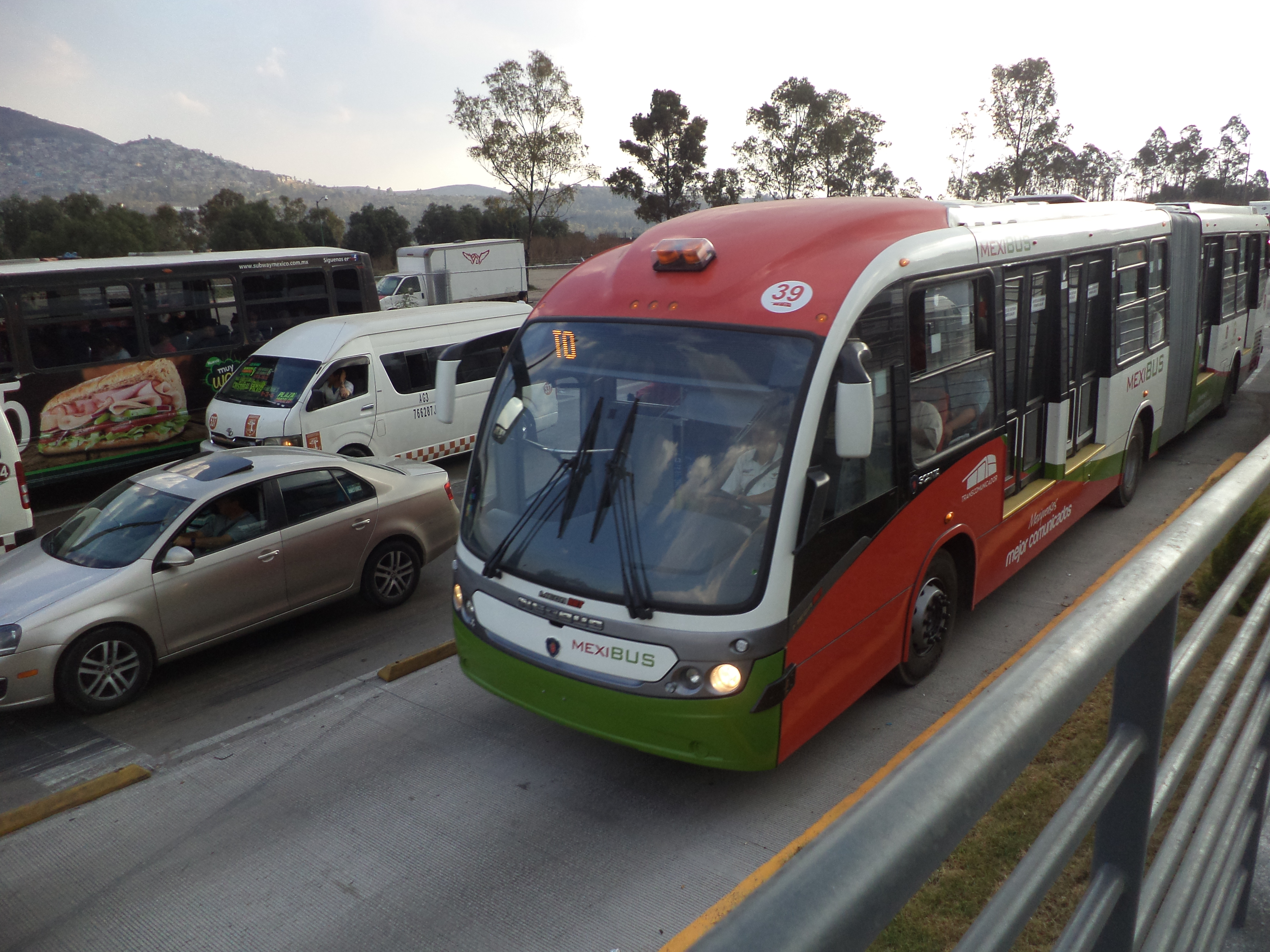 Autobus articulado del Mexibus línea 2